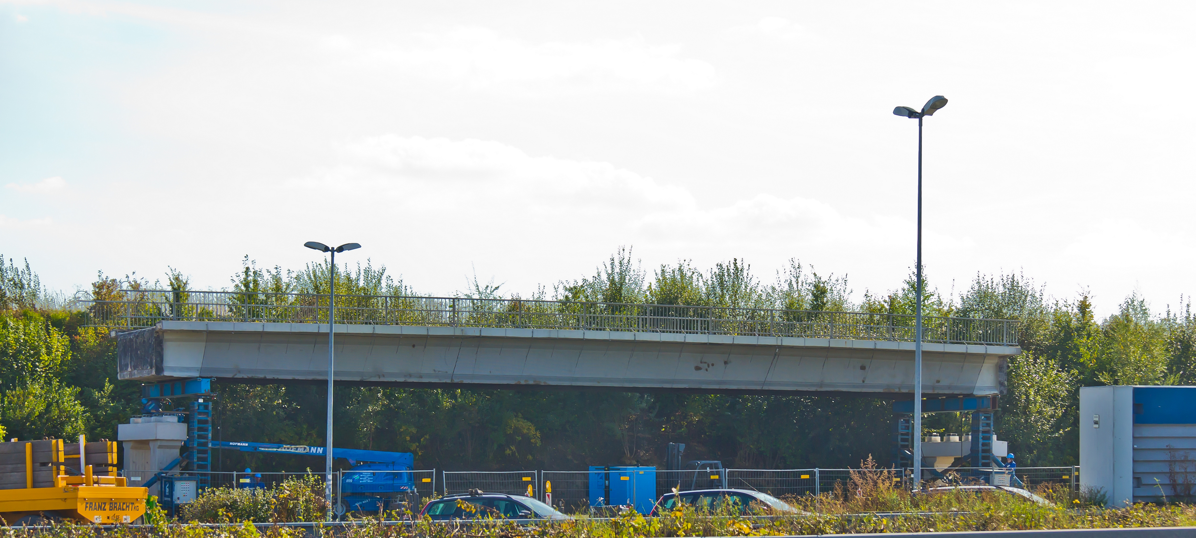 Die Autobahn-Überführung Weg Hesseler wurde in der Nacht 29./30.September 2012 auf den Rastplatz Vellern transportiert, wo sie als Baudenkmal aufgestellt bleibt